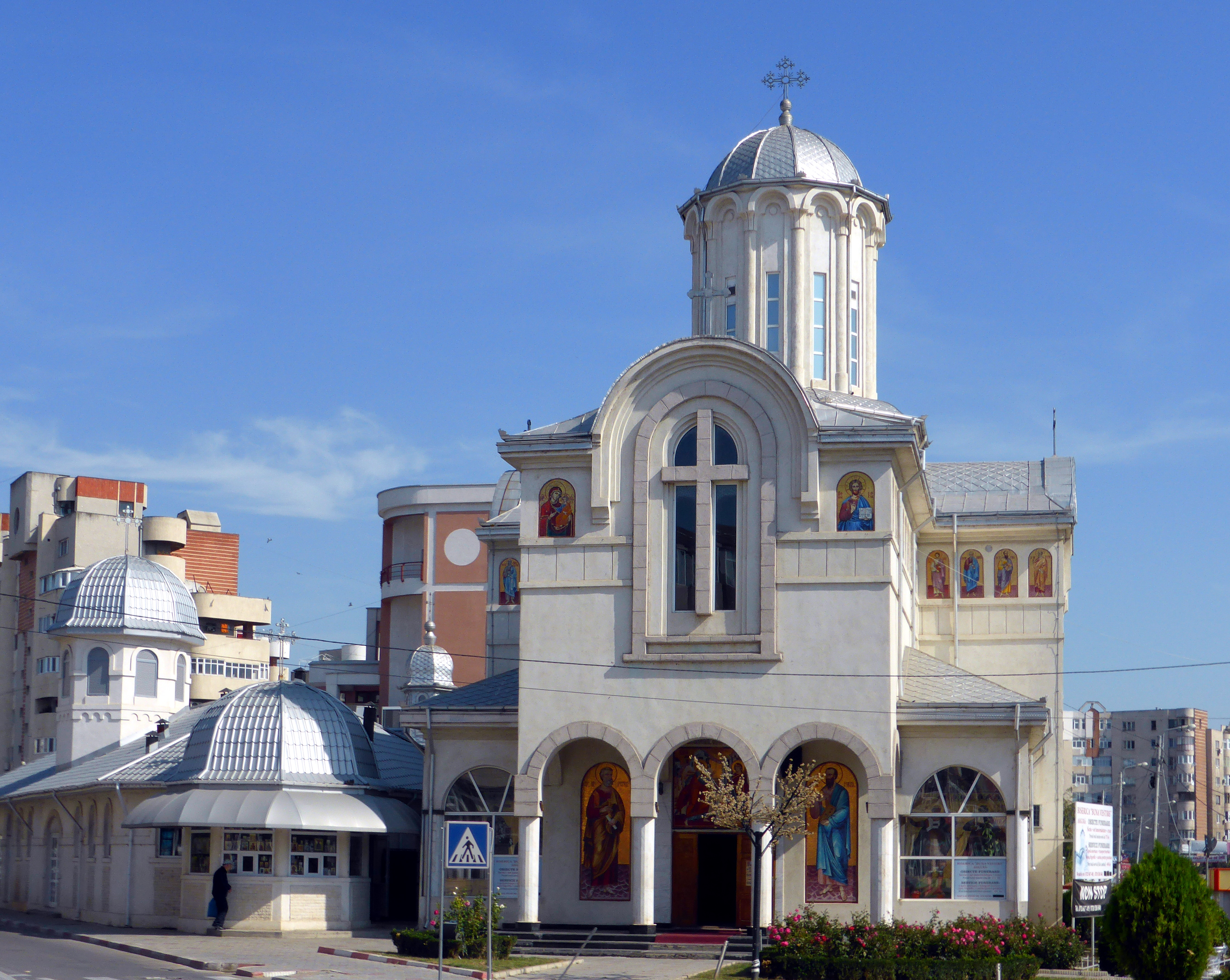 Năvodari (Kreis Konstanza, Rumänien), Verkündigungskirche.